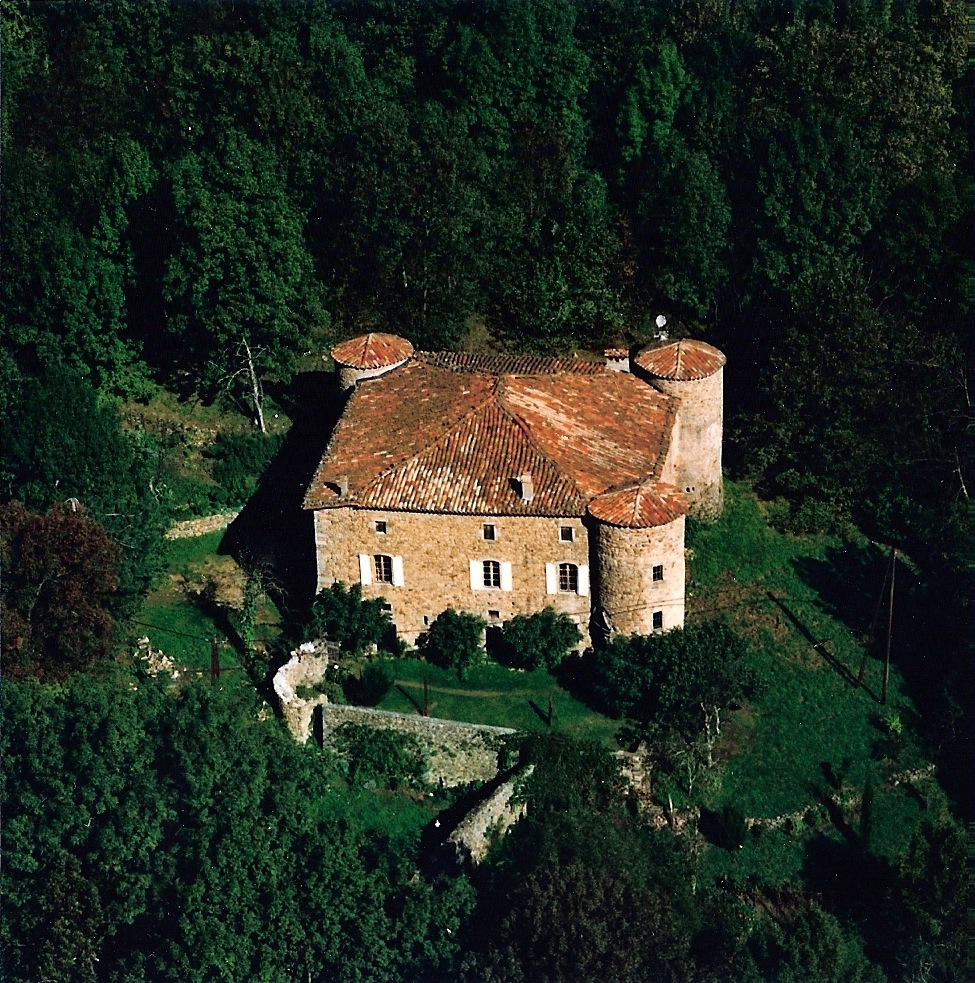 Vue d'ensemble du Château du Pin (16e siècle), à Fabras (Ardèche, France).